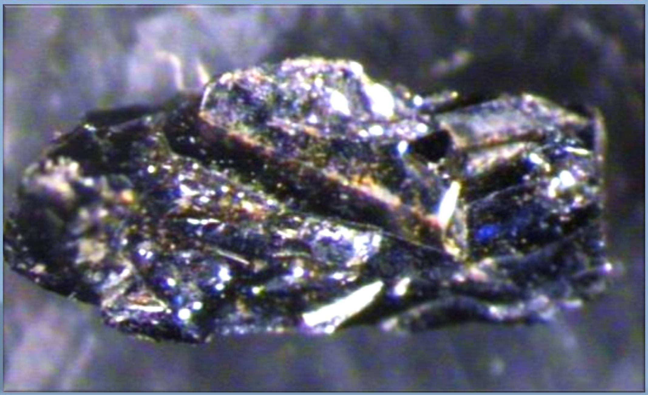 חברת "שפע ימים" העוסקת באקספלורציה של יהלומים, אבני חן וזהב בצפון ישראל, דיווחה החל משנת 2001, כי במסגרת פעילותה מצאה גבישי מואסניט - באותה עת היה הגדול שבהם בגודל של 3.5 מ"מ